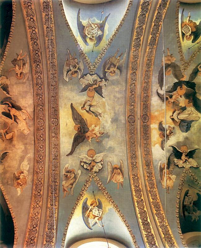 Włodzimierz Tetmajer